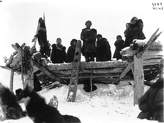 Korjaci na střeše zimního obydlí. Fotografie z jesupské severopacifické expedice.